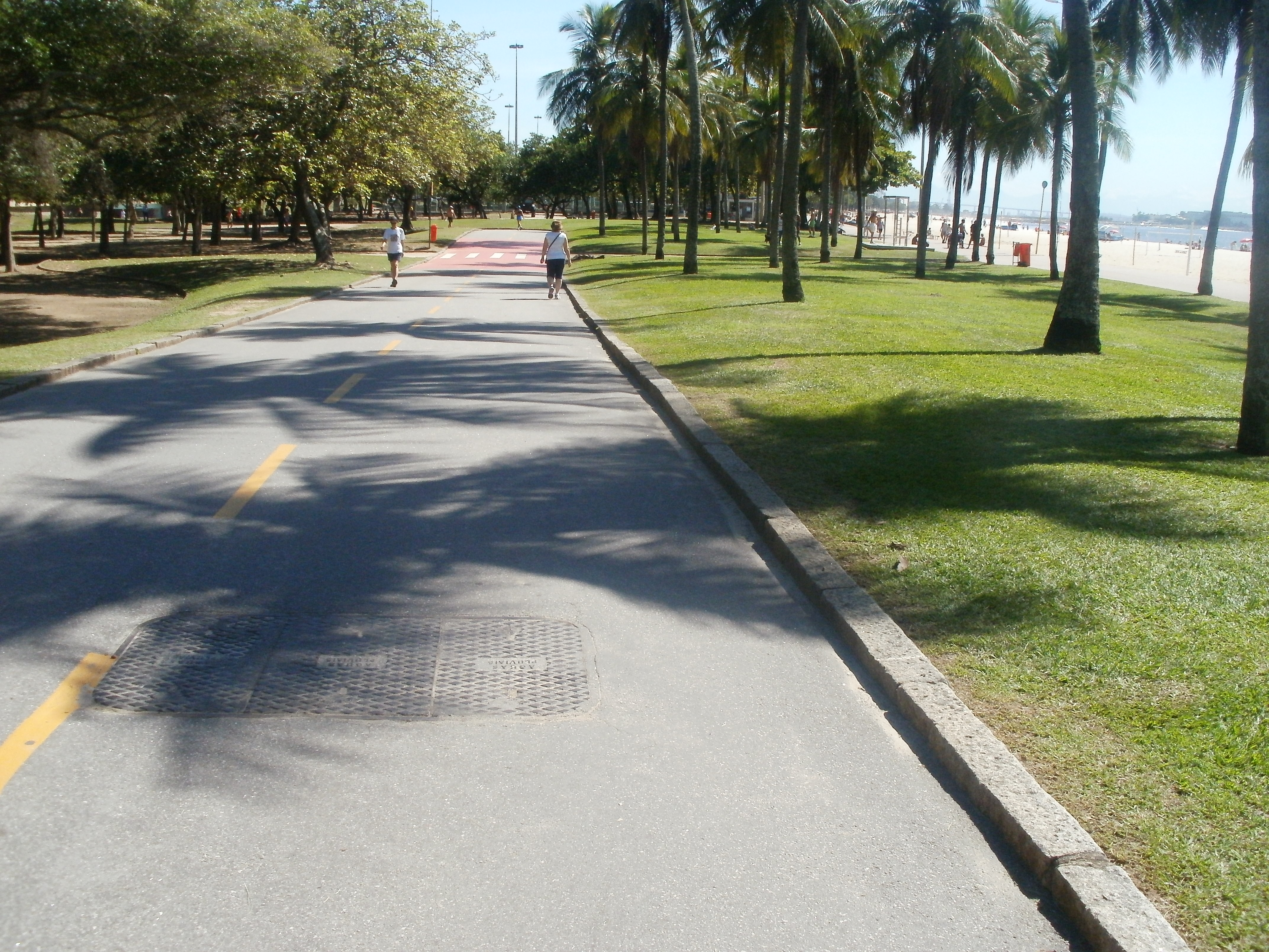 Rua Brigadeiro Eduardo Gomes, no Parque do Flamengo, na cidade do Rio de Janeiro, Brasil.